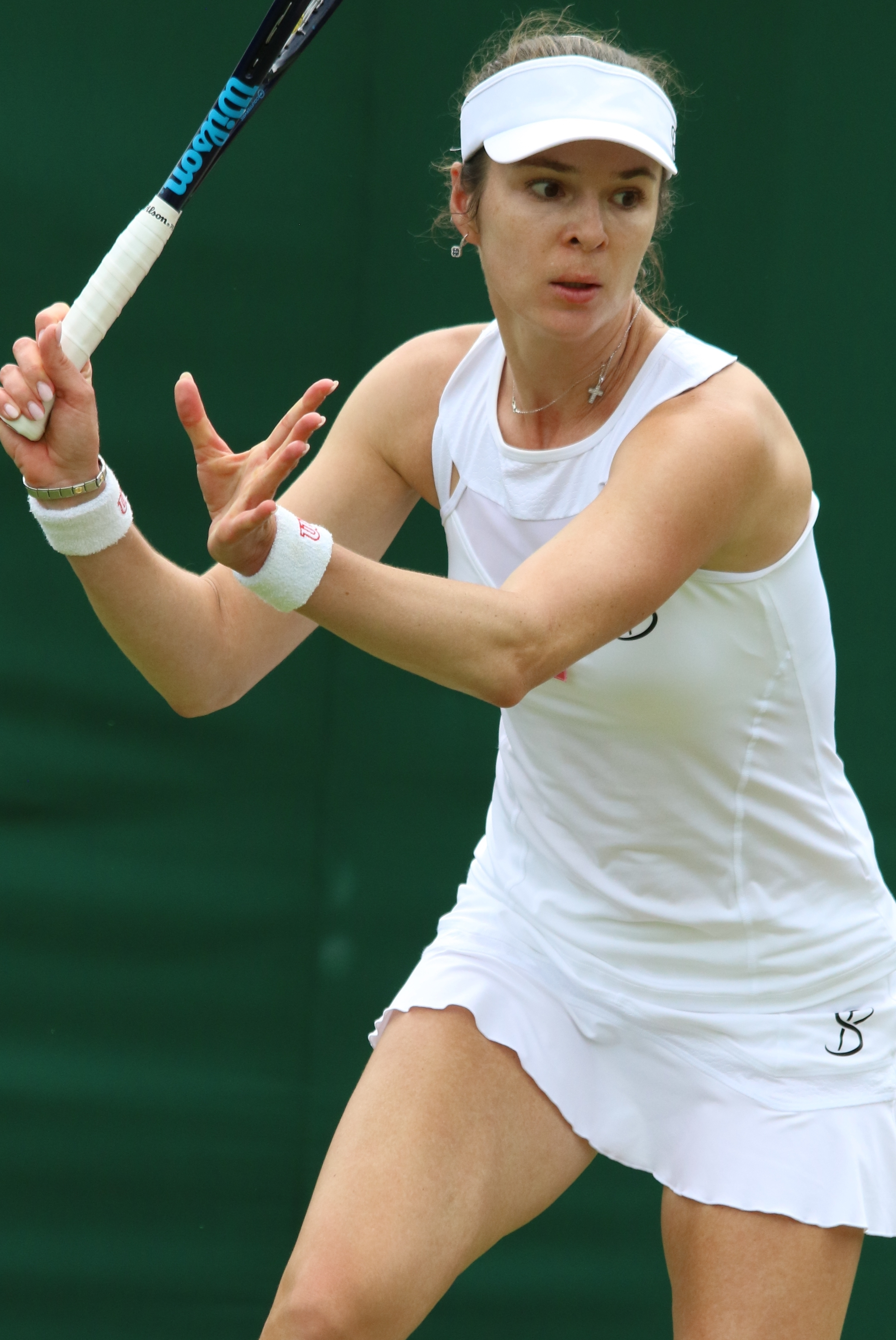 Voskoboeva WM19 (30)